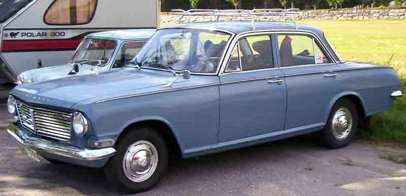 Vauxhall 4-Door Saloon